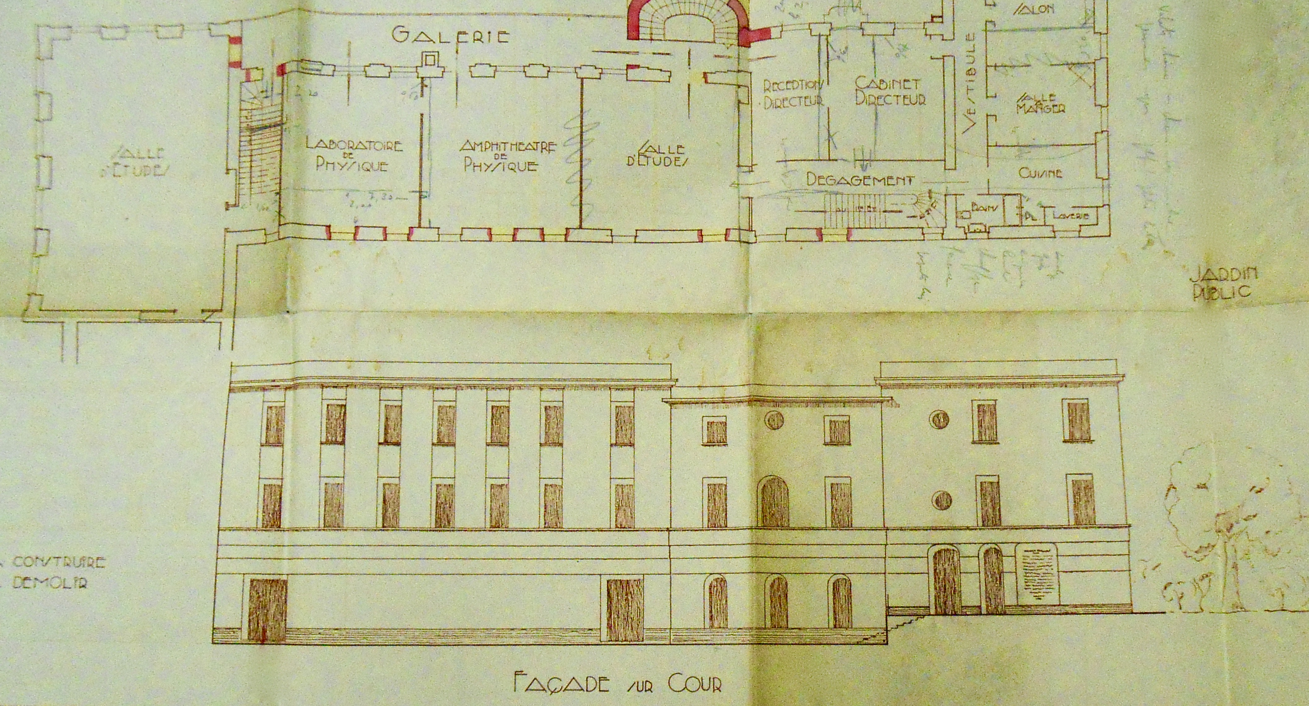 Plan École Pratique d'industrie de Saint-Chamond, 1929, archives municipales